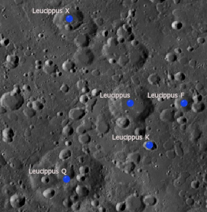 Cráter lunar Leucippus. Cráteres satélite. (Imagen LRO)